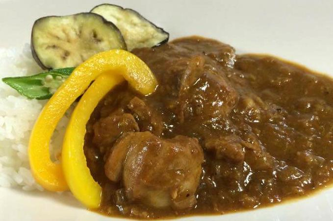 ながとりめんとともにチームNGTの代表的なメニュー